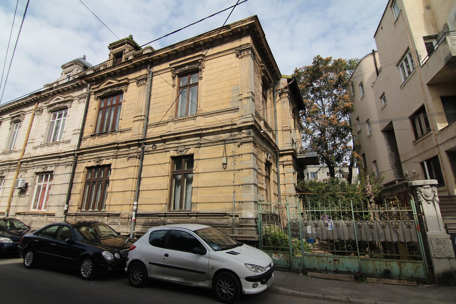 Casă pe Str Robescu